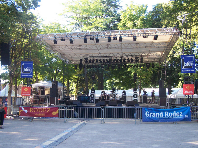 Empot Grand 2003